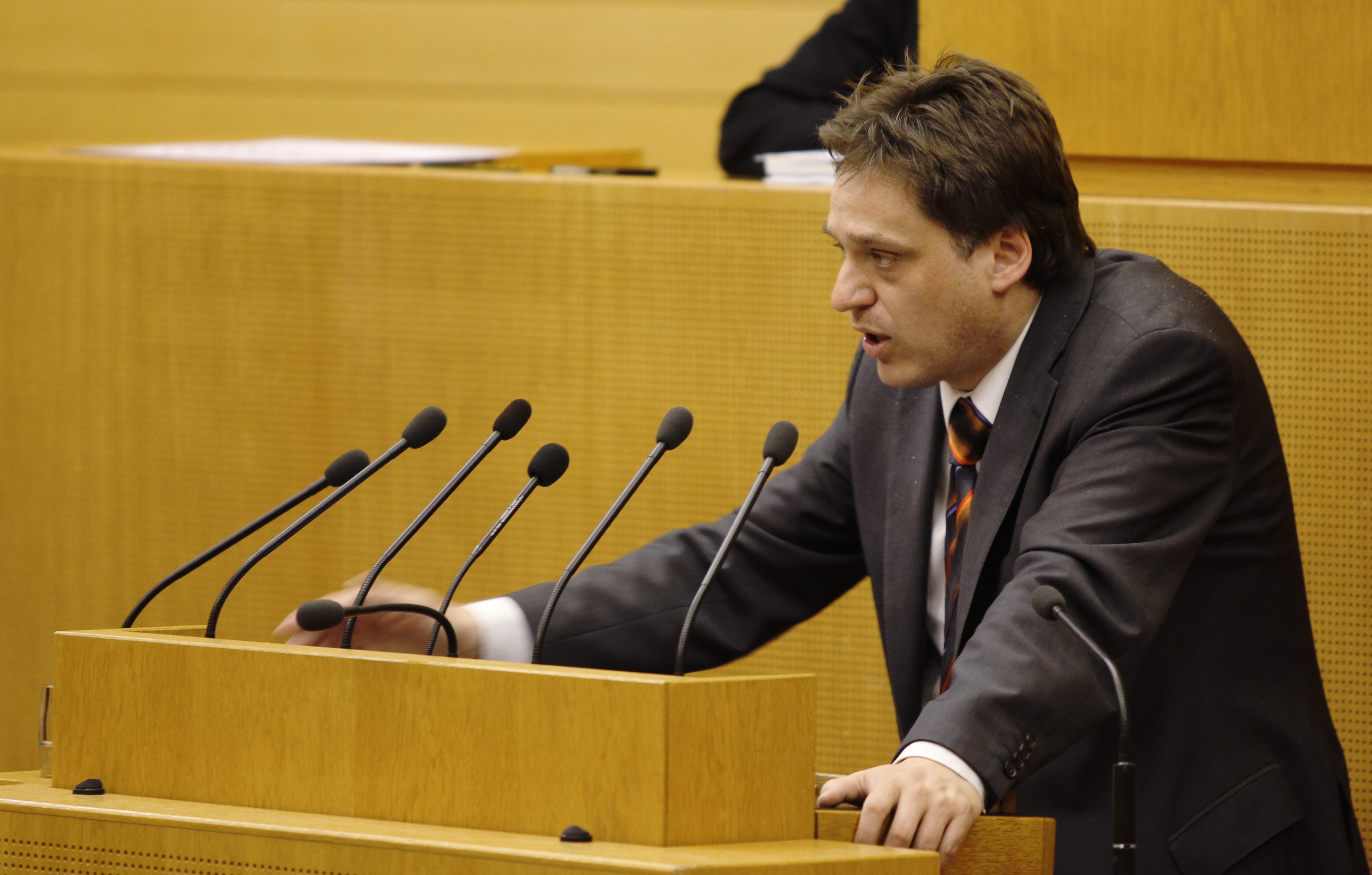 Johannes Stober im Plenarsaal des Landtages von Baden-Württemberg. Wikipedia im Landtag – Baden-Württemberg 15.–16. Mai 2013 in Stuttgart Fragen zur Nachnutzung Wenn Sie Fragen zur Nachnutzung dieses Bildes haben, können Sie sich jederzeit gern an wenden Personality rights warningAlthough this work is freely licensed or in the public domain, the person(s) shown may have rights that legally restrict certain re-uses unless those depicted consent to such uses. In these cases, a model release or other evidence of consent could protect you from infringement claims.